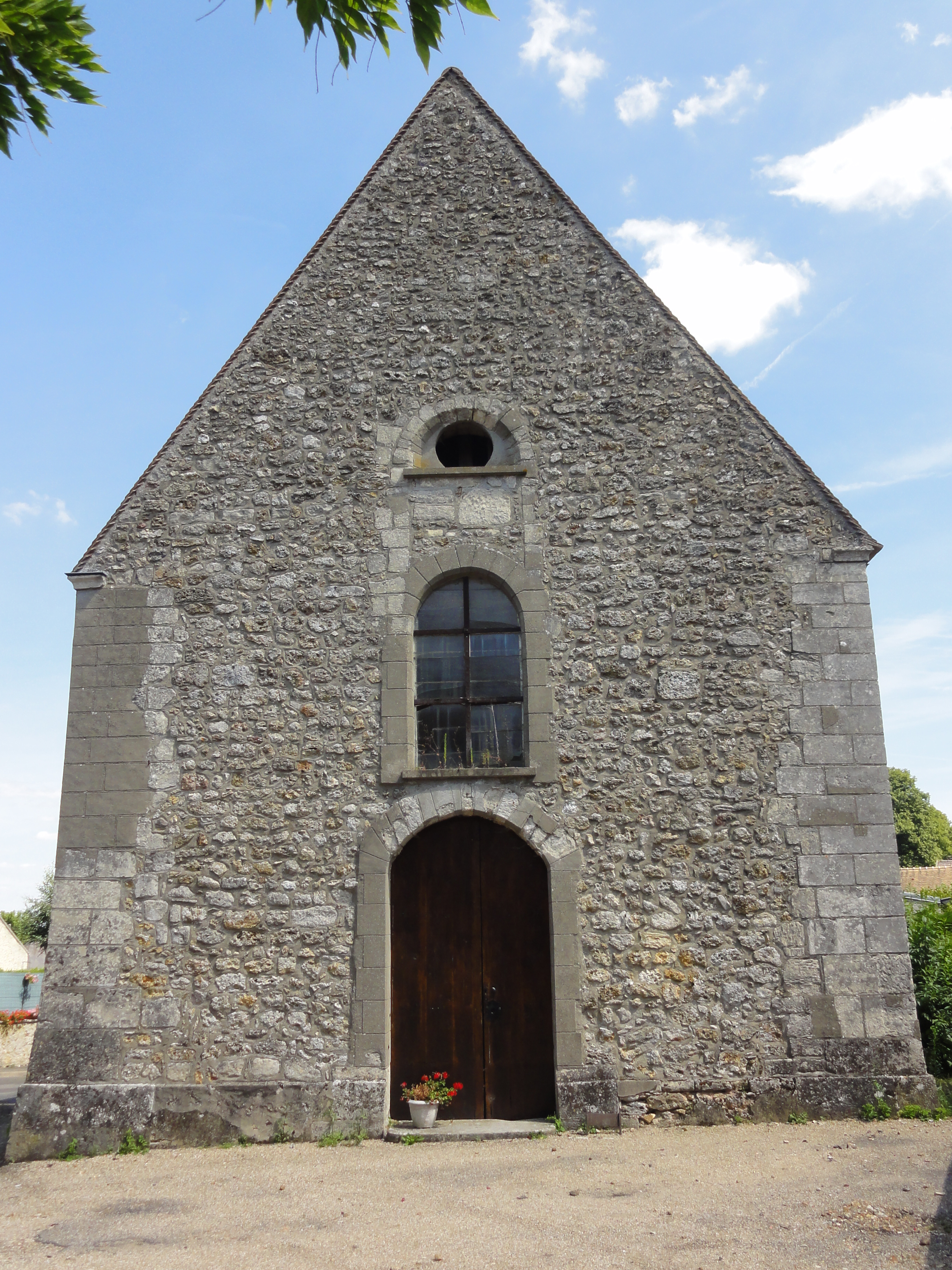 Église Saint-Aignan d'Arthies (voir titre).